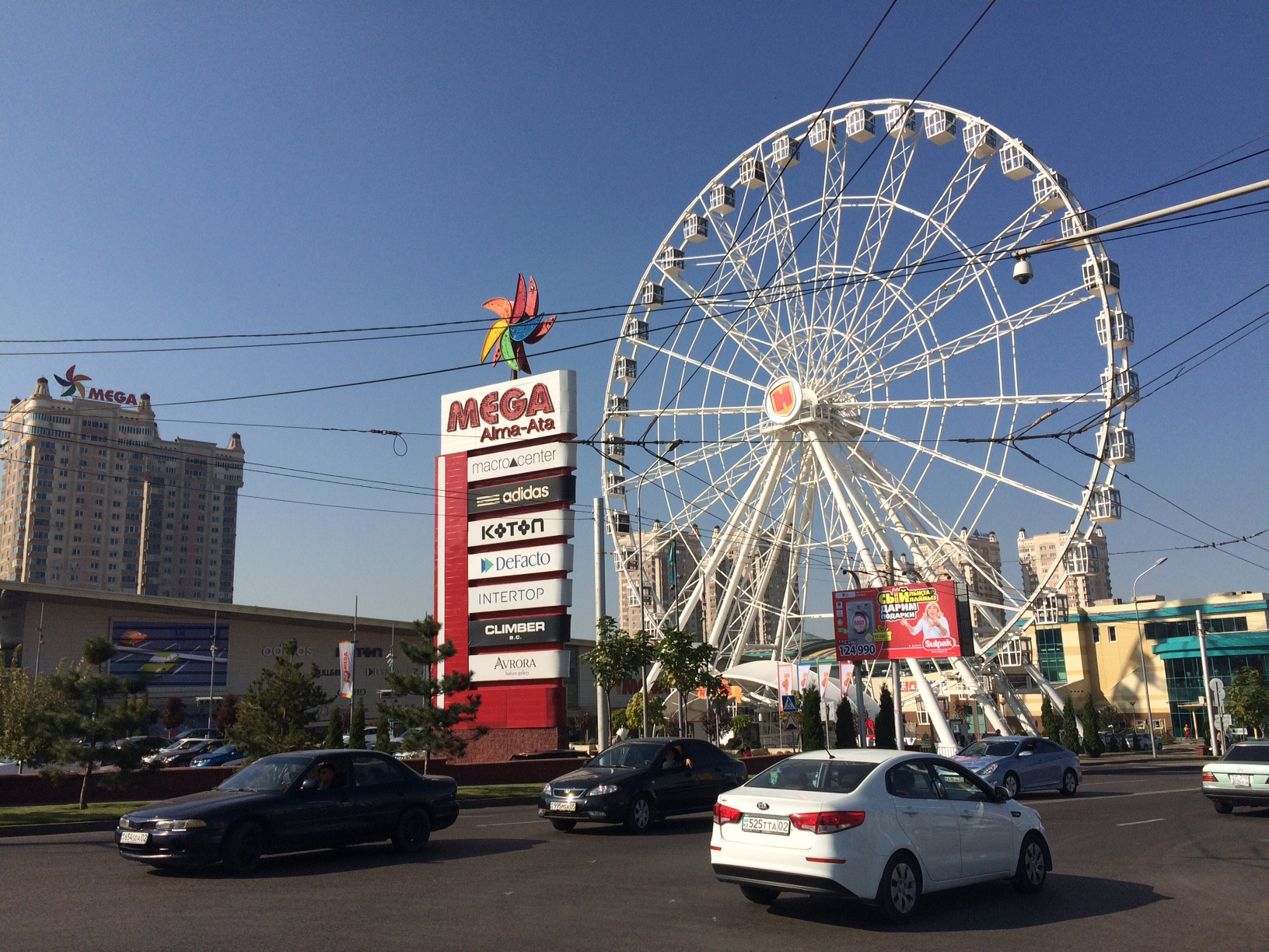 Колесо обозрения у ТРЦ "Мега - Алматы"